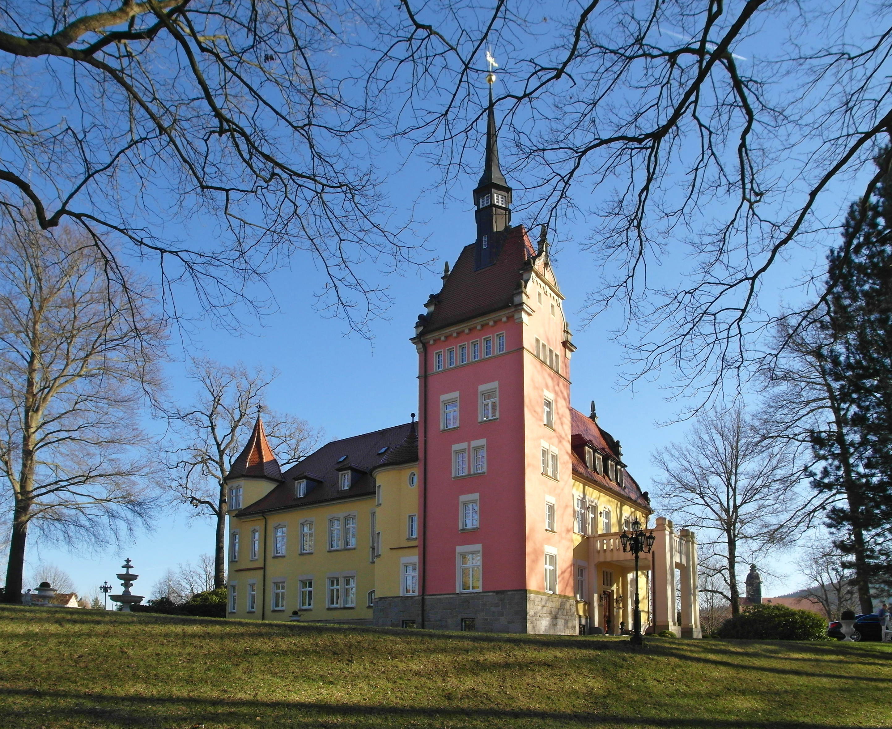 27.03.2017 02689 Taubenheim (Sohland Spree) Sohlander Straße 2: Schloß OberTaubenheim wurde unter Marie von Nostitz und Jänckendorf 1887 auf dem oberen Hof errichtet. In der DDR Kindergenesungsheim. Ab 2003 Privatbesitz. Unter der Bezeichnung „Oberes Schloß Philippi als Gesundheits- und Schönheitszentrum genutzt. Sicht von Norden. [SAM9069.JPG]20170327575DR.JPG(c)Blobelt